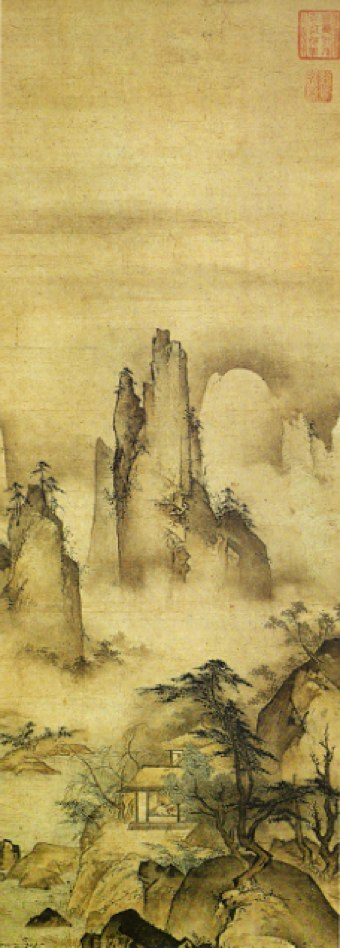 Printemps dans la montagne par le peintre japonais Gakuō du XVe siècle. Encre et couleurs légères sur papier. (71,8x25,4 centimètres). Cette œuvre est conservée au Musée de Baltimore.